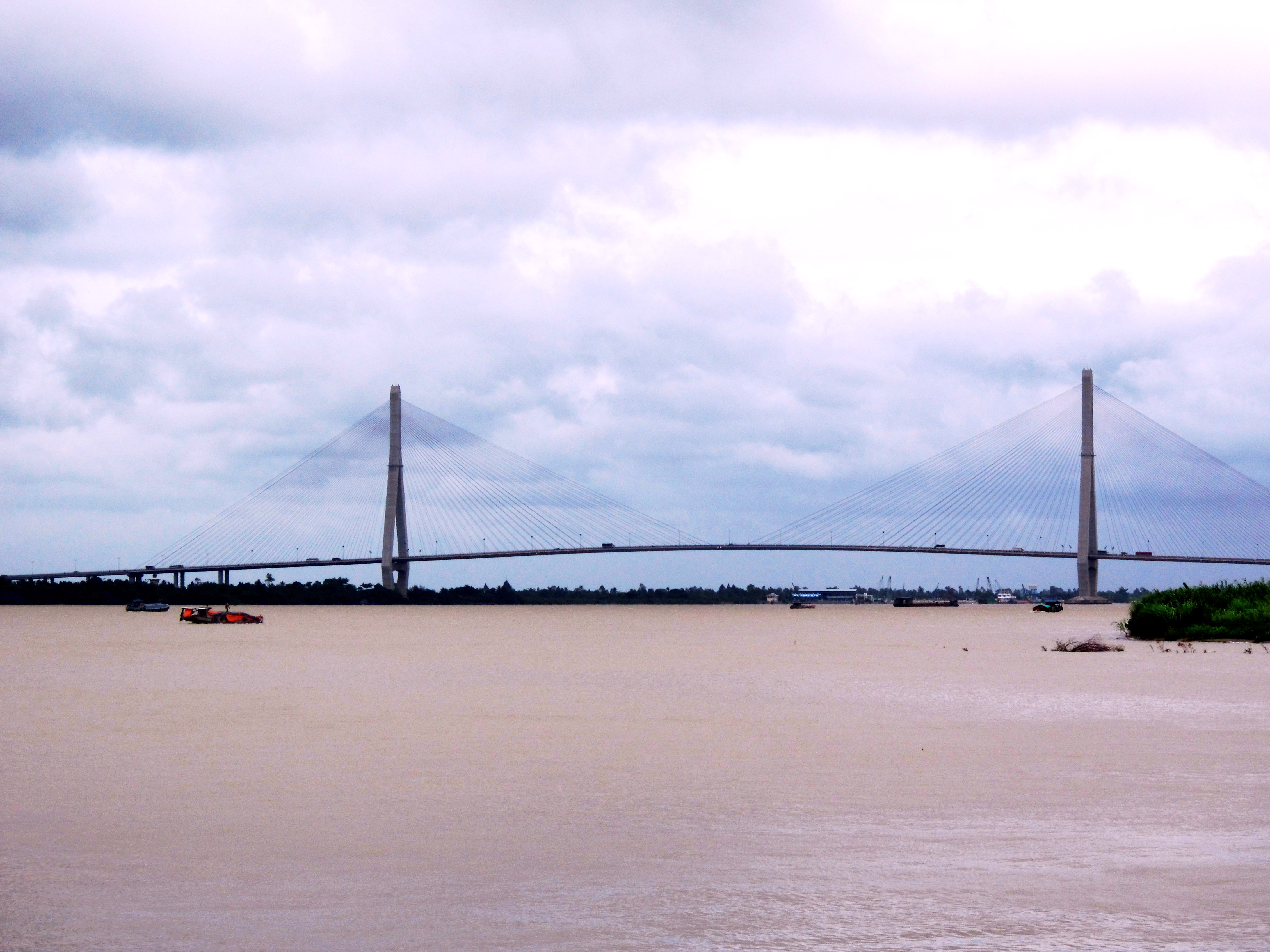 Cầu Cần Thơ (Việt Nam) nhìn từ xa.